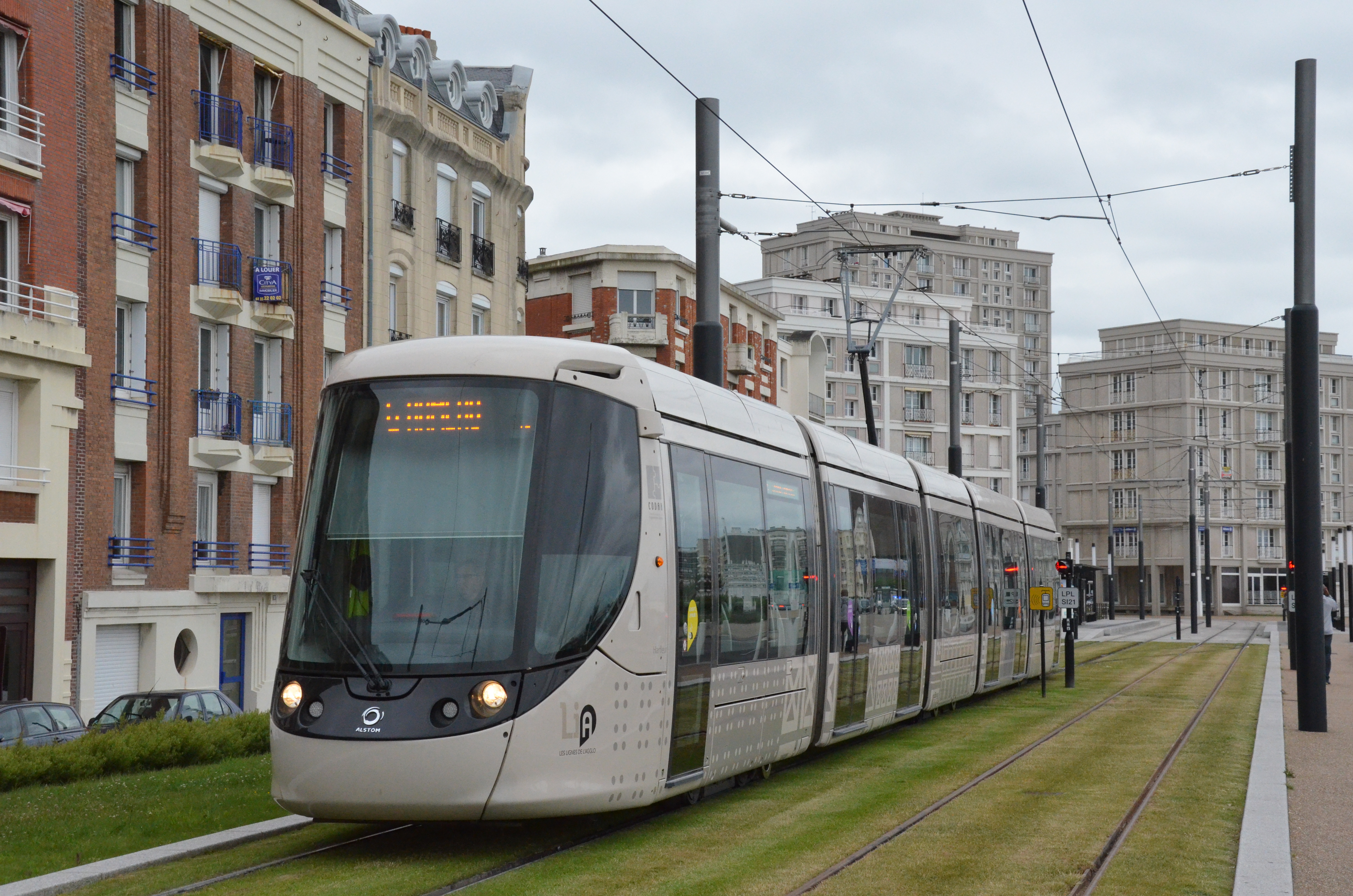 Alstom Citadis 302 n°008 de la ligne A du tramway du Havre, à son terminus La Plage.